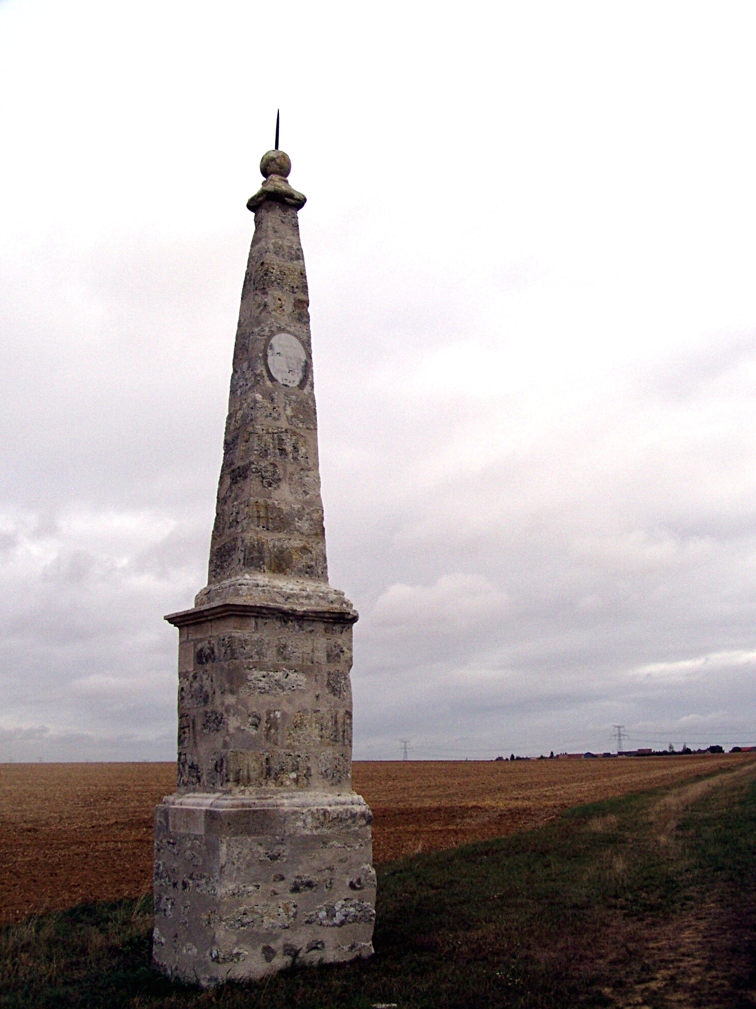 Photo personnelle du monument indiquant le méridien de Paris levé en 1748 par Cassini